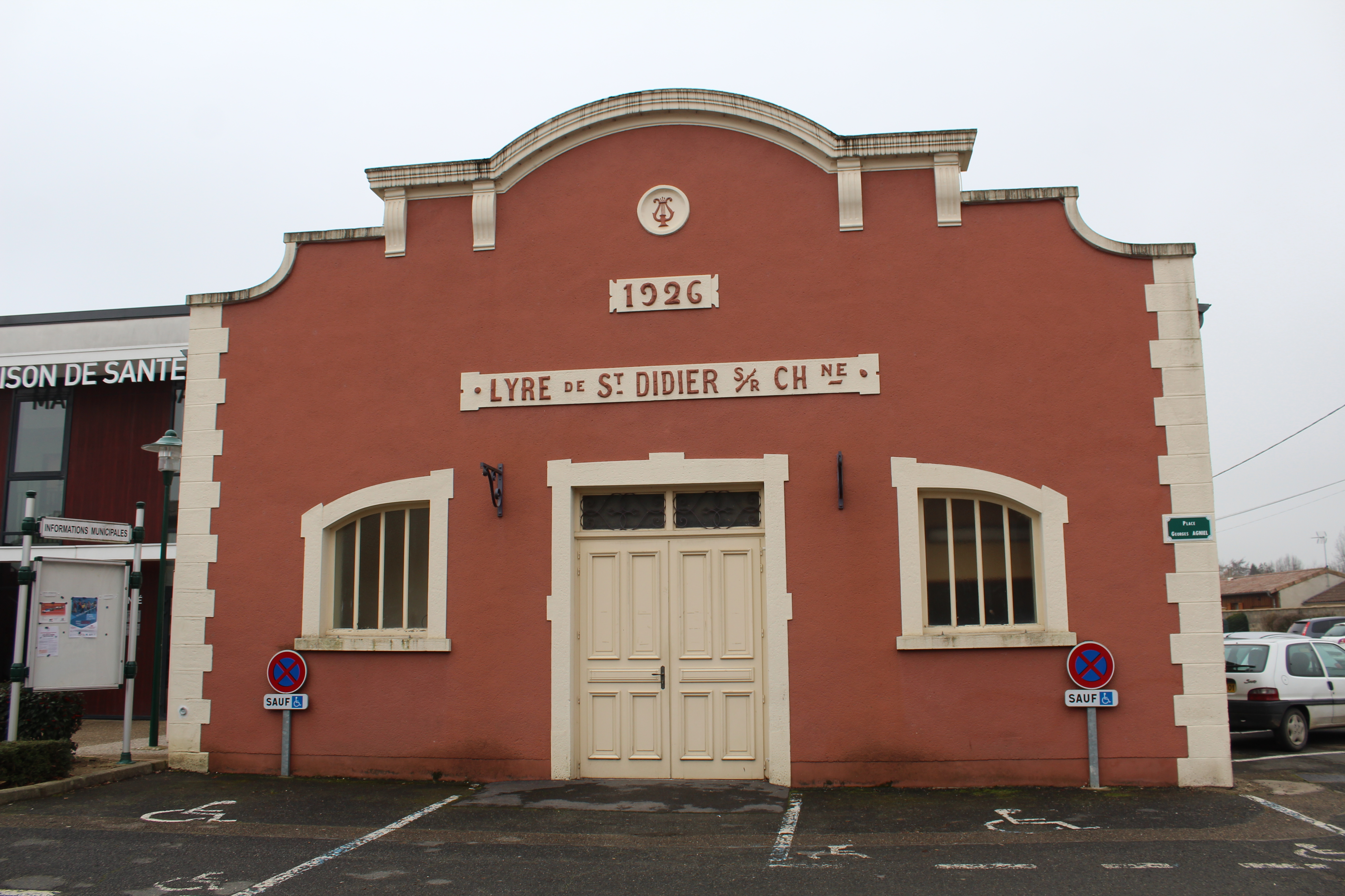 Salle de la Lyre à Saint-Didier-sur-Chalaronne.